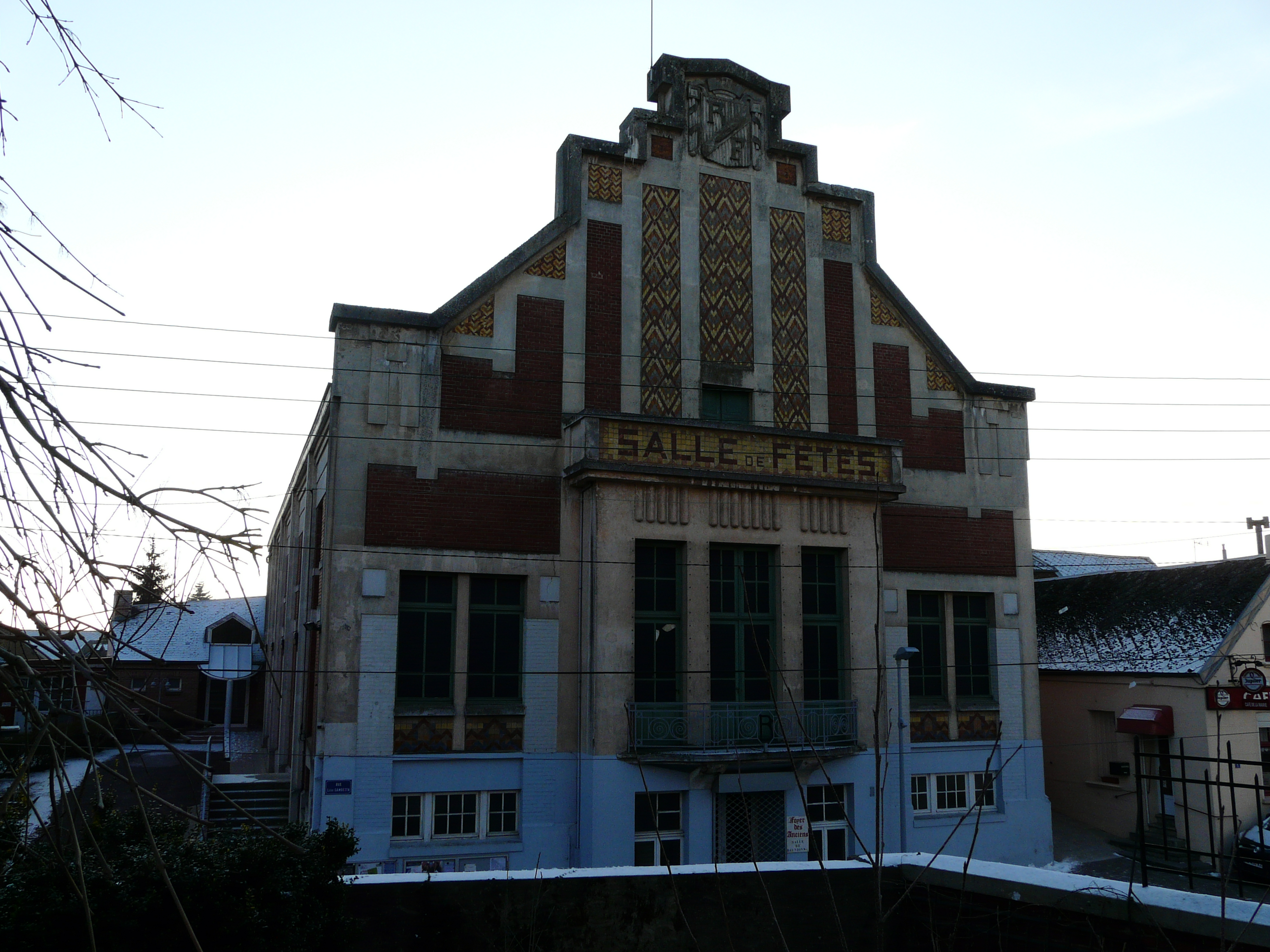 La salle des fêtes "art déco" de Bertry (Nord)